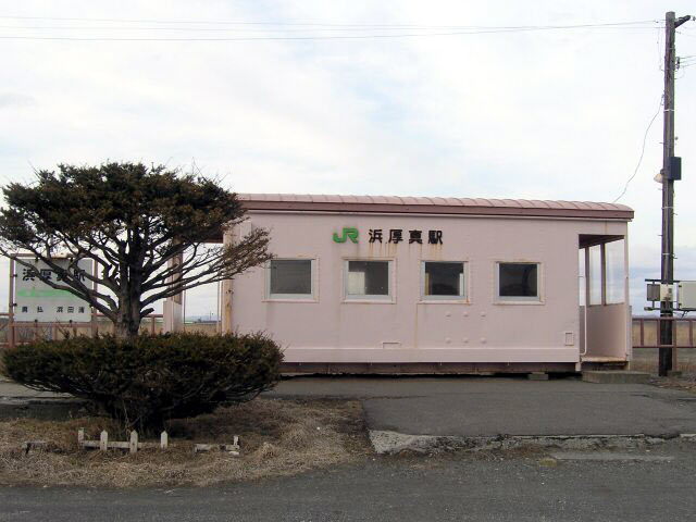 Hama-atsuma Station in Hidaka Main Line, Japan